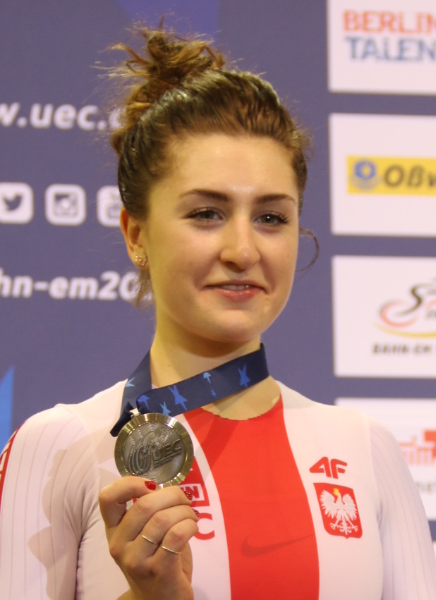 Justyna Kaczkowska, polnische Radsportlerin - Silber in der Einerverfolgung